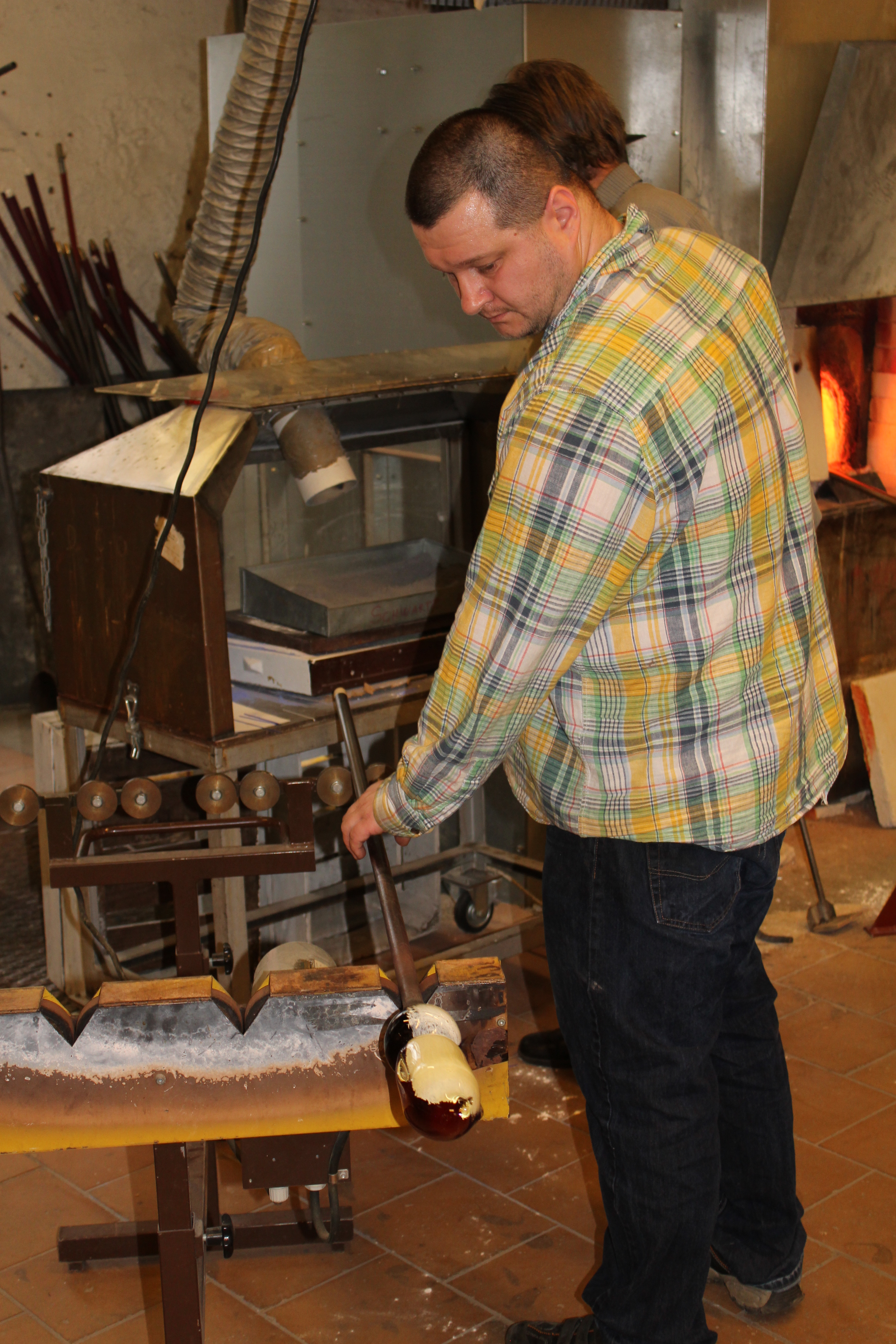 Glassblåser i aksjon ved Gjøvik glassverk.